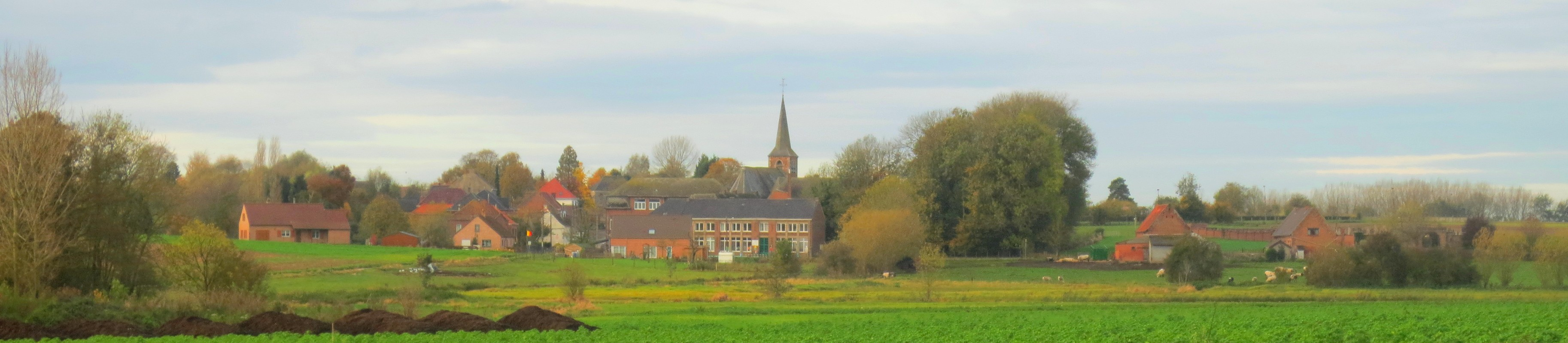 Maulde